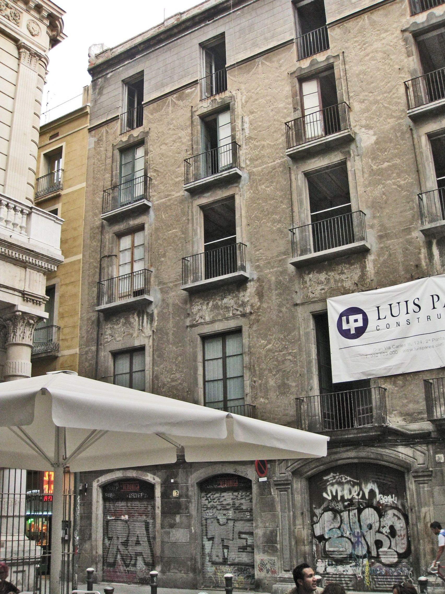 Casa dels Quatre Rius, del segle XVIII, situada al carrer d'Avinyó núm. 30, al barri Gòtic de Barcelona. És famosa pels seus esgrafiats, actualment molt malmesos i en tràmit de restauració.